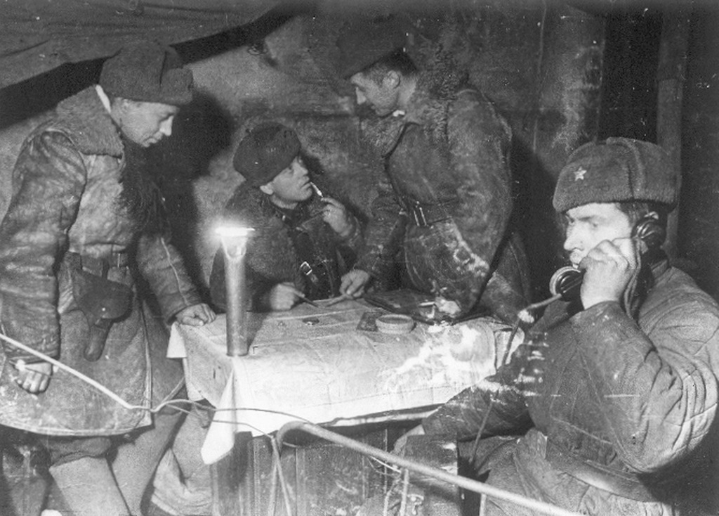 Командный пункт 178-го артиллерийского полка (45-ая стрелковая дивизия) майора Ростовцева в подвале калибровочного цеха завода «Красный Октябрь». Декабрь 1942 г